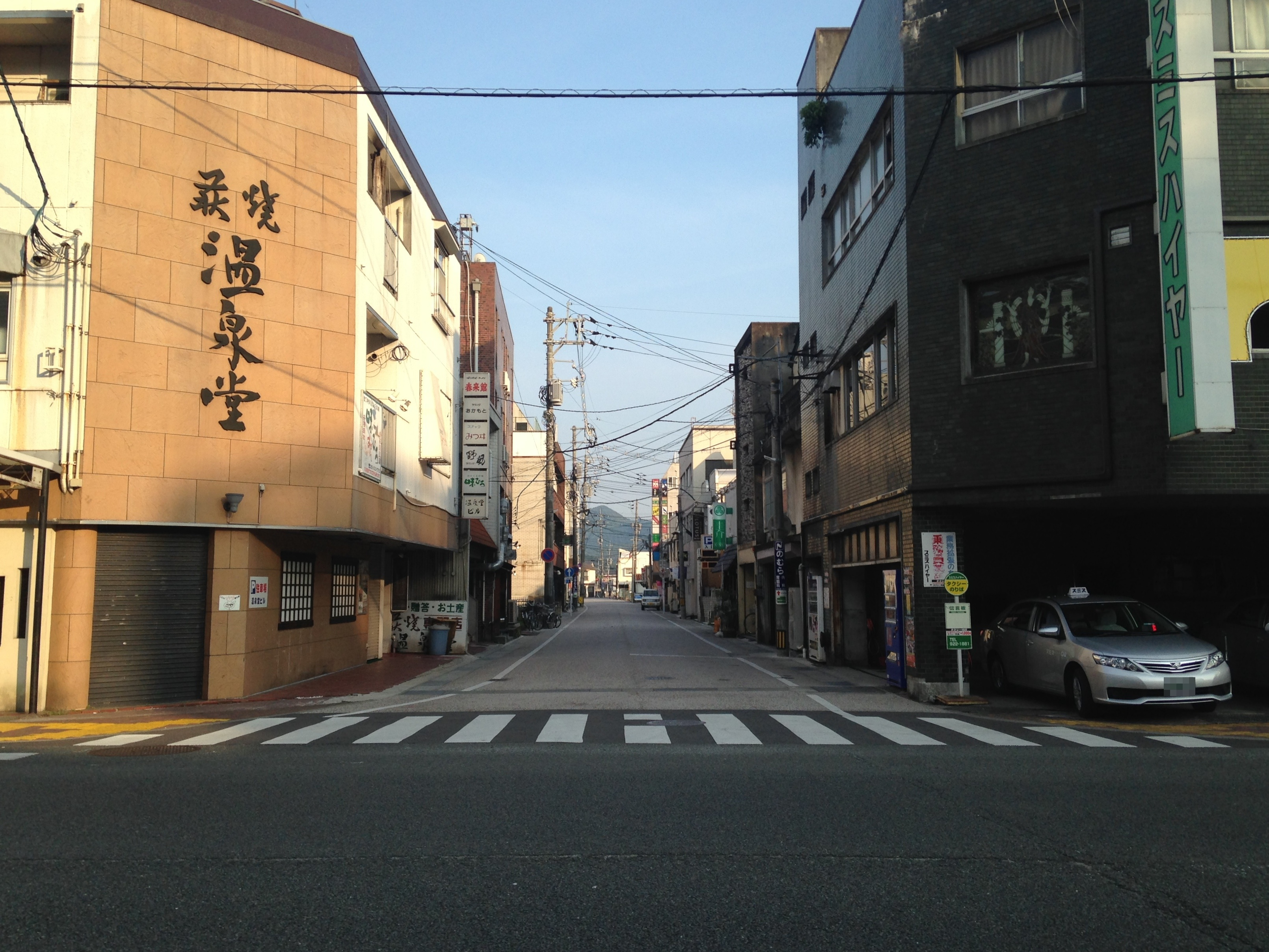 北側より望む湯田温泉街の温泉通り